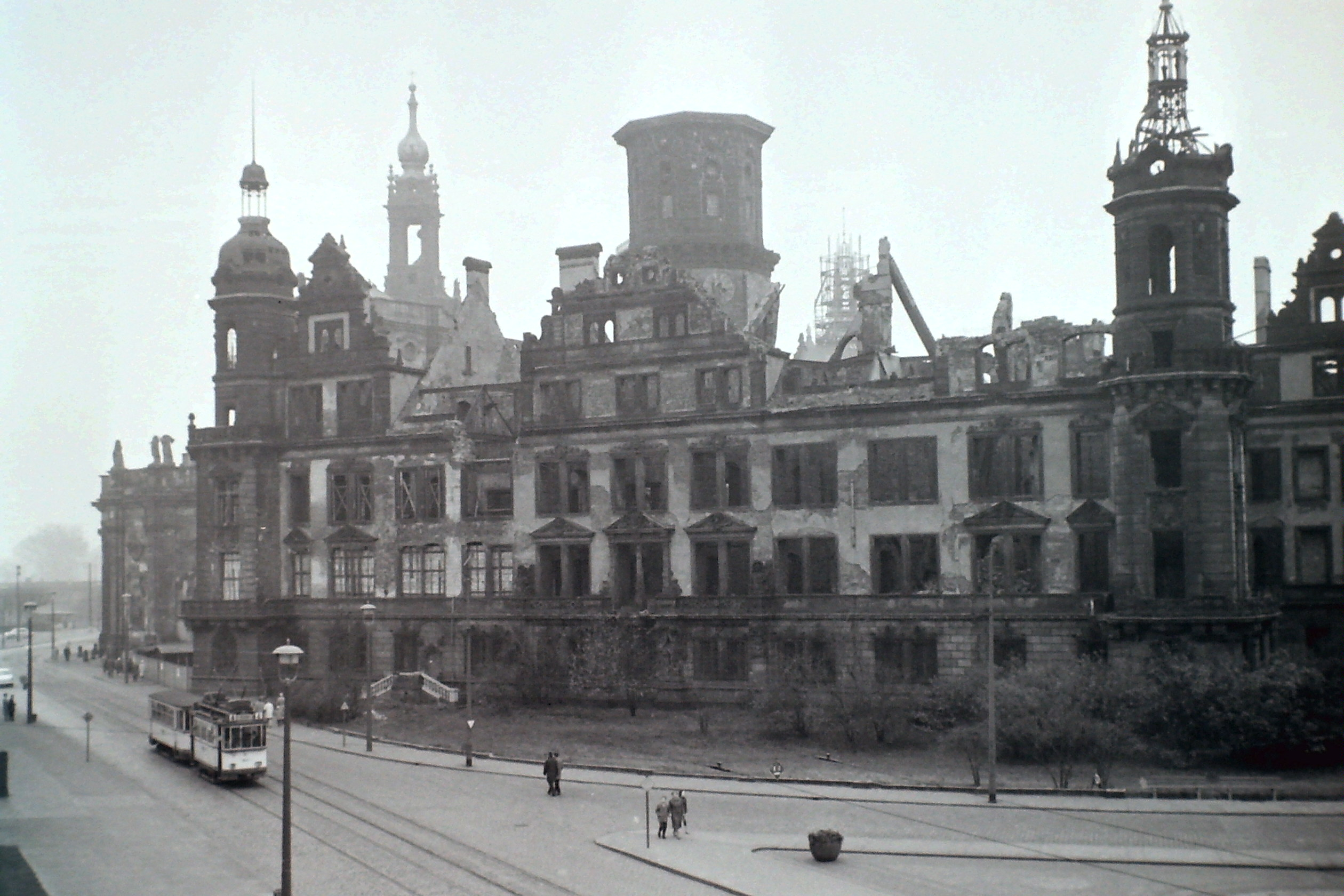 Ruine des Dresdner Schlosses, Blick von Südwesten